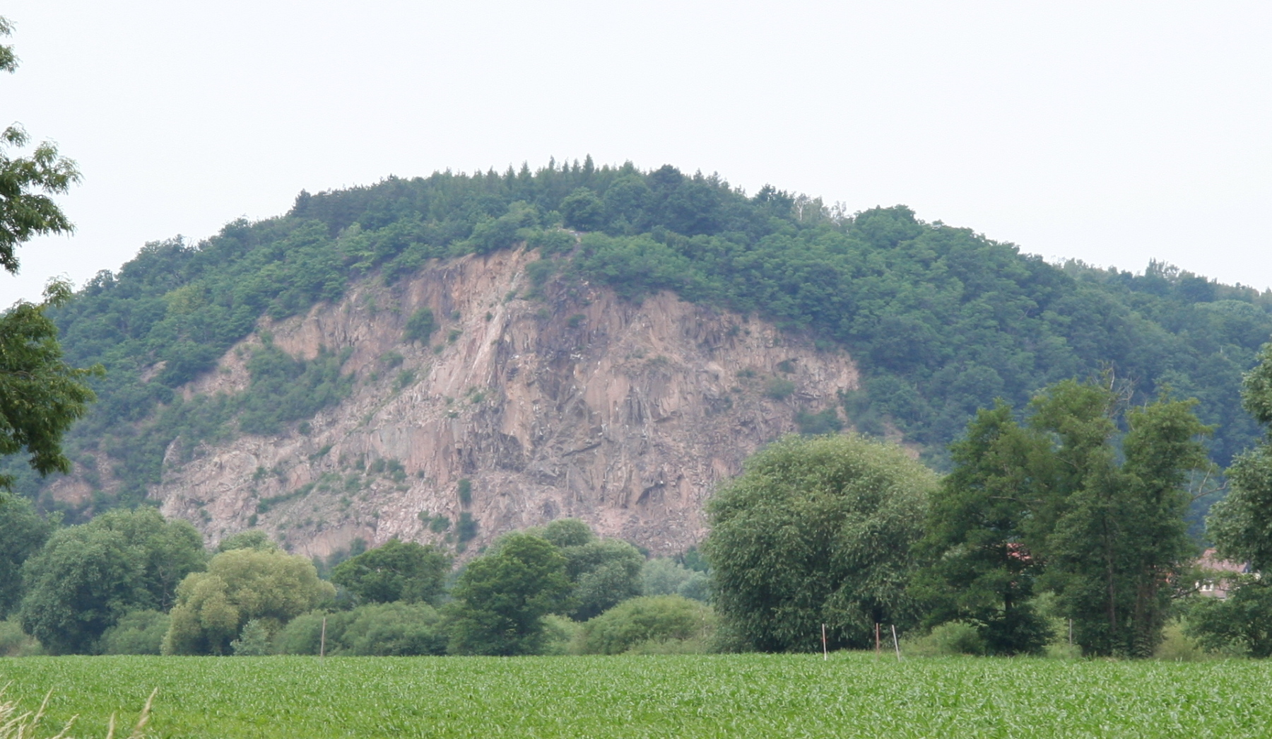 Blick über die Elbe auf die Boselspitze von der B6 aus